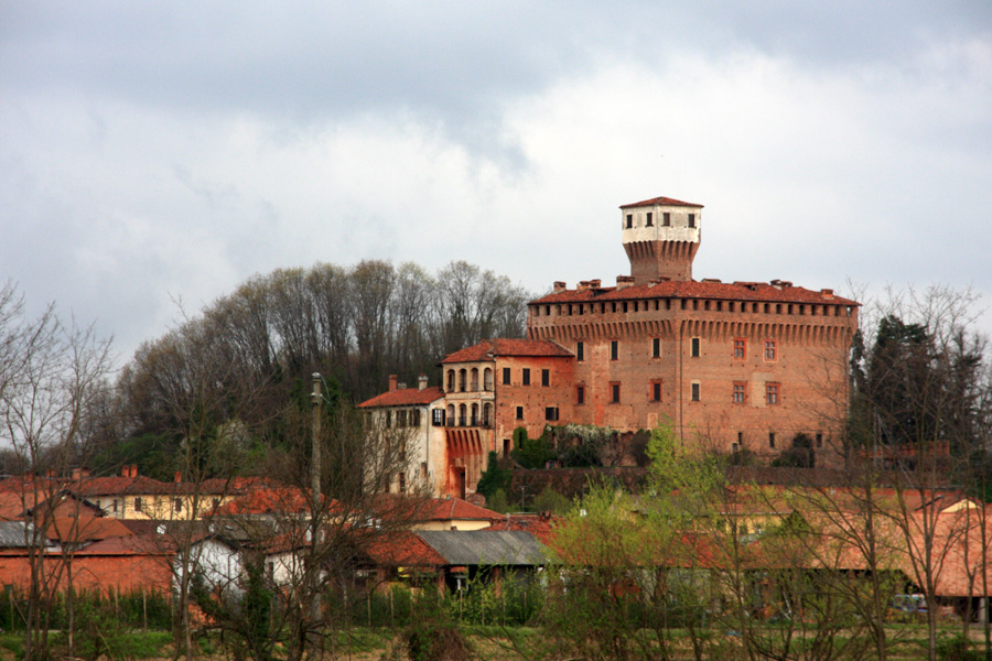 Veduta di Briona (NO) con il castello